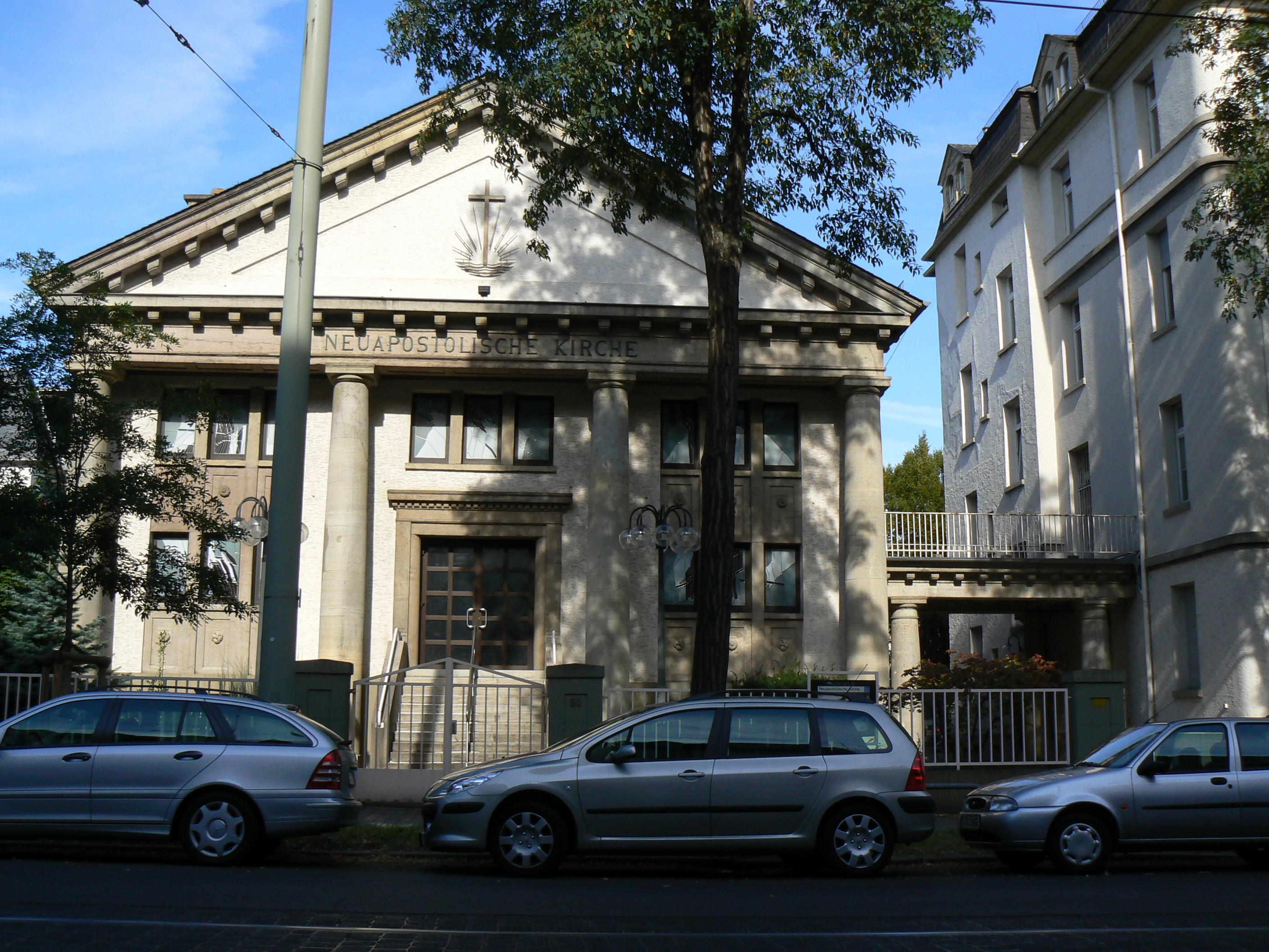 Neoapostolische Kirche, Frankfurt-Bockenheim, Sophienstraße 50, mit tempelartiger Säulenfassade im Stil des Neoklassismus.